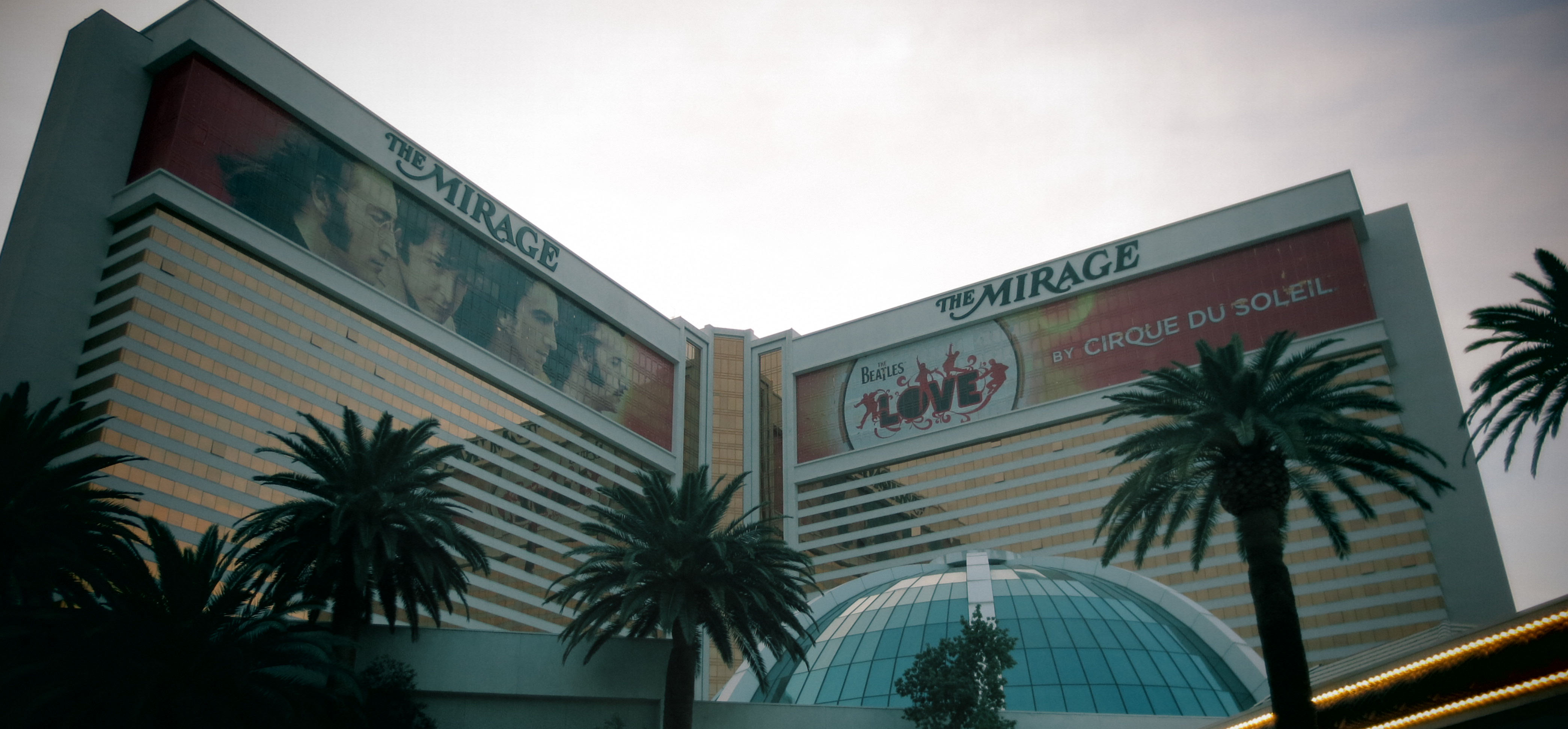 Affiche du spectacle Love